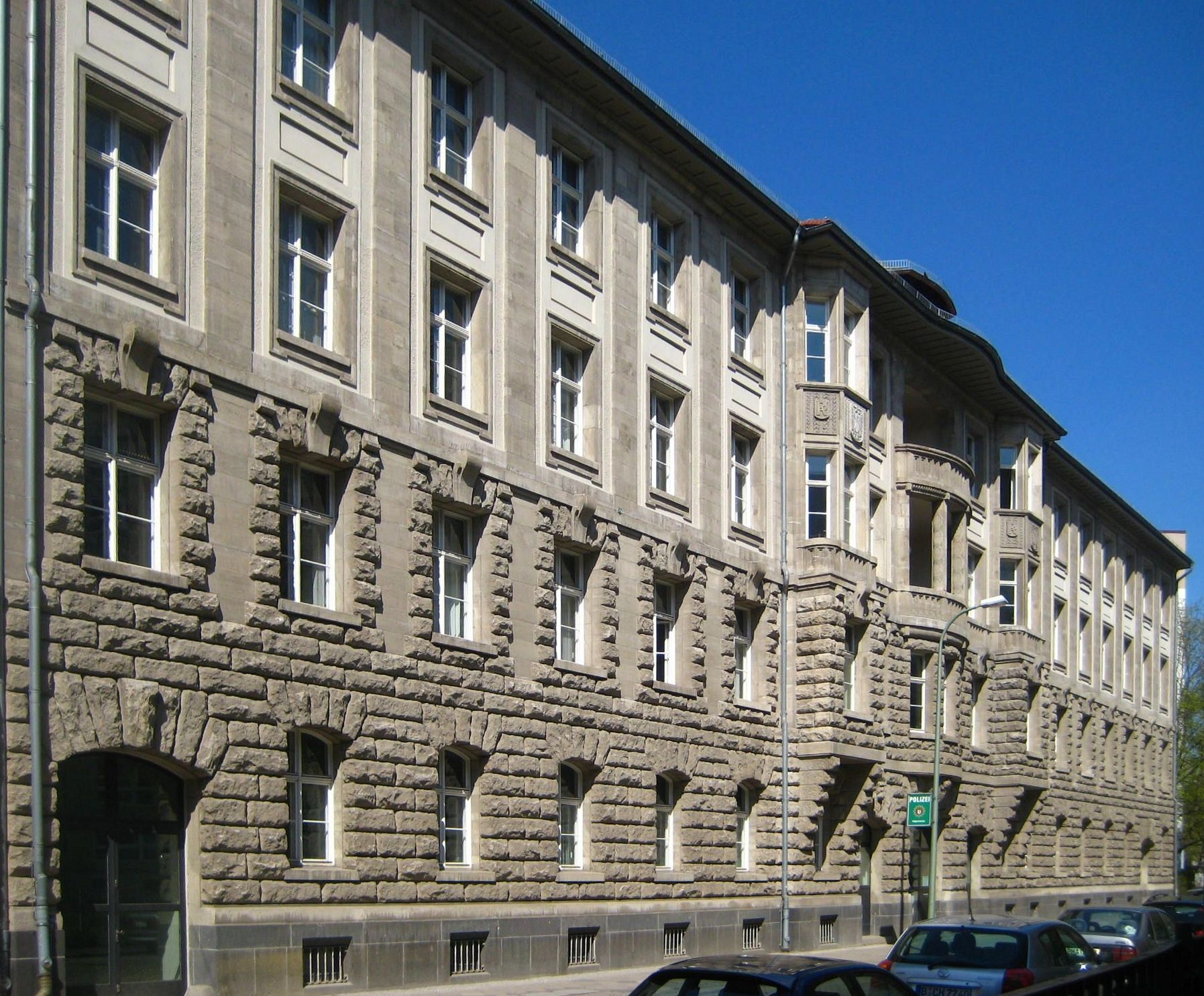 Polizeidienstgebäude in der Magazinstraße 3-5 in Berlin-Mitte, erbaut 1907-1908 nach Entwürfen des Architekten Paul Graef. Das als Dienstsitz der Berliner Baupolizei errichtete Gebäude besteht aus einem Vorderhaus, zwei Mittelflügeln, einem Seitenflügel und einem Quergebäude und fass vier Höfe ein. Die Fassade, die Stilelemente des Barock und der Renaissance verbindet, ist im Erdgeschoss mit Muschelkalk verkleidet, darüber zeigt sich Verputz mit Werksteinrahmung. Die Mitte ist mit Erkern und Loggien hervorgehoben. Dahinter liegen das aufwändig gestaltete zentrale Treppenhaus und der Sitzungssaal. Das Gebäude beherbergte im Laufe der Zeit unterschiedliche polizeiliche Dienststellen, so in der Weimarer Republik die "Deutsche Zentralpolizeistelle zur Bekämpfung unzüchtiger Bilder, Schriften und Inserate." Heute befindet sich hier das "Referat Verkehrsordnungswidrigkeiten und Bußgeldeinziehung" der Berliner Polizei.